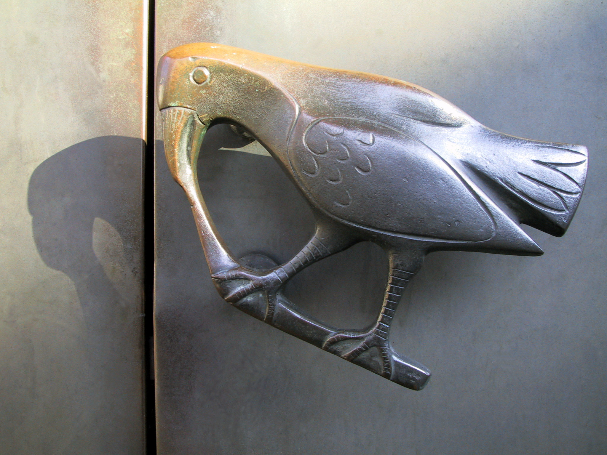 Bronzegriff am Eingangsportal der Corvinuskirche in Hannover-Stöcken in Gestalt eines Raben (lat.: Corvinus). Entwurf der Hannoverschen Bildhauerin Ingeborg Steinohrt.